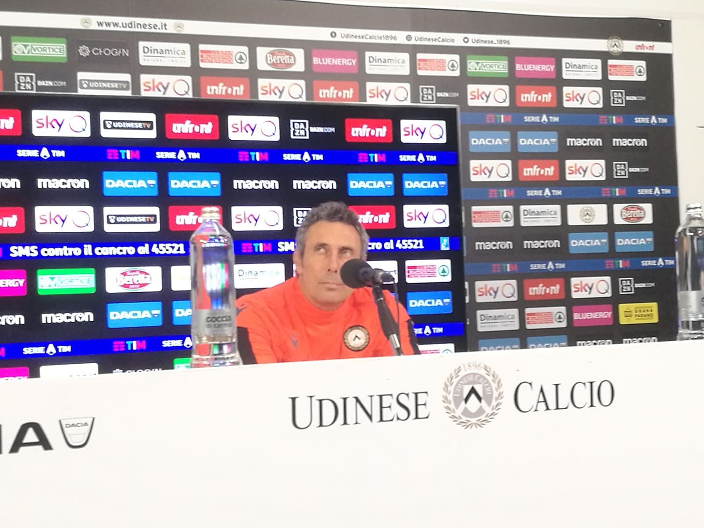 Luca Gotti con la divisa dell'Udinese